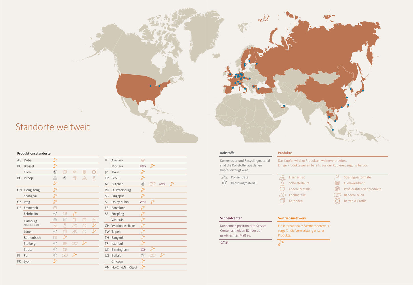 Weltkarte mit Standorten der Aurubis AG aus der aktuellen Kupferstory